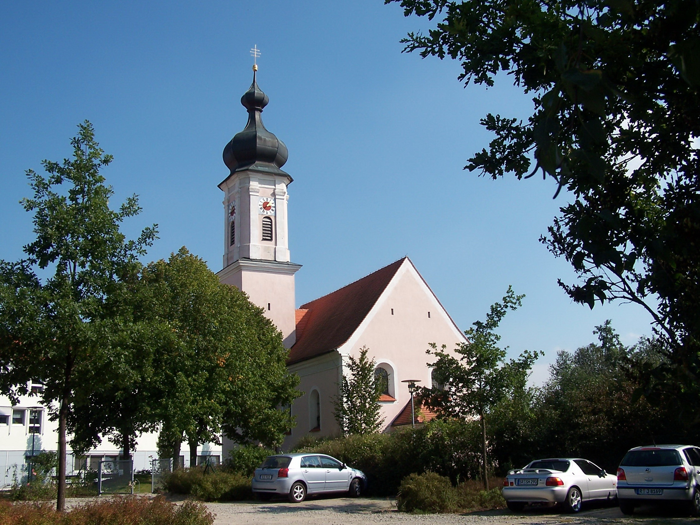 Katholische Nebenkirche St. Mauritius, Saalbau mit eingezogenem Chor, Flankenturm mit Zwiebelhaube, Vorzeichen und Pilastergliederung, um 1700; mit Ausstattung.